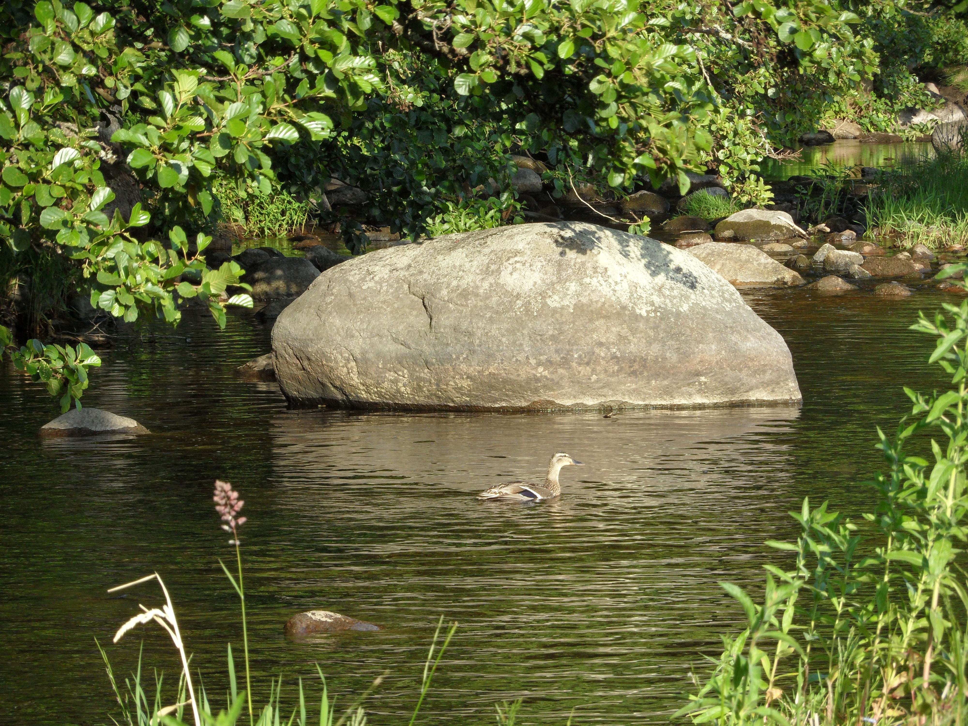 Räby hällor en av bäckarna